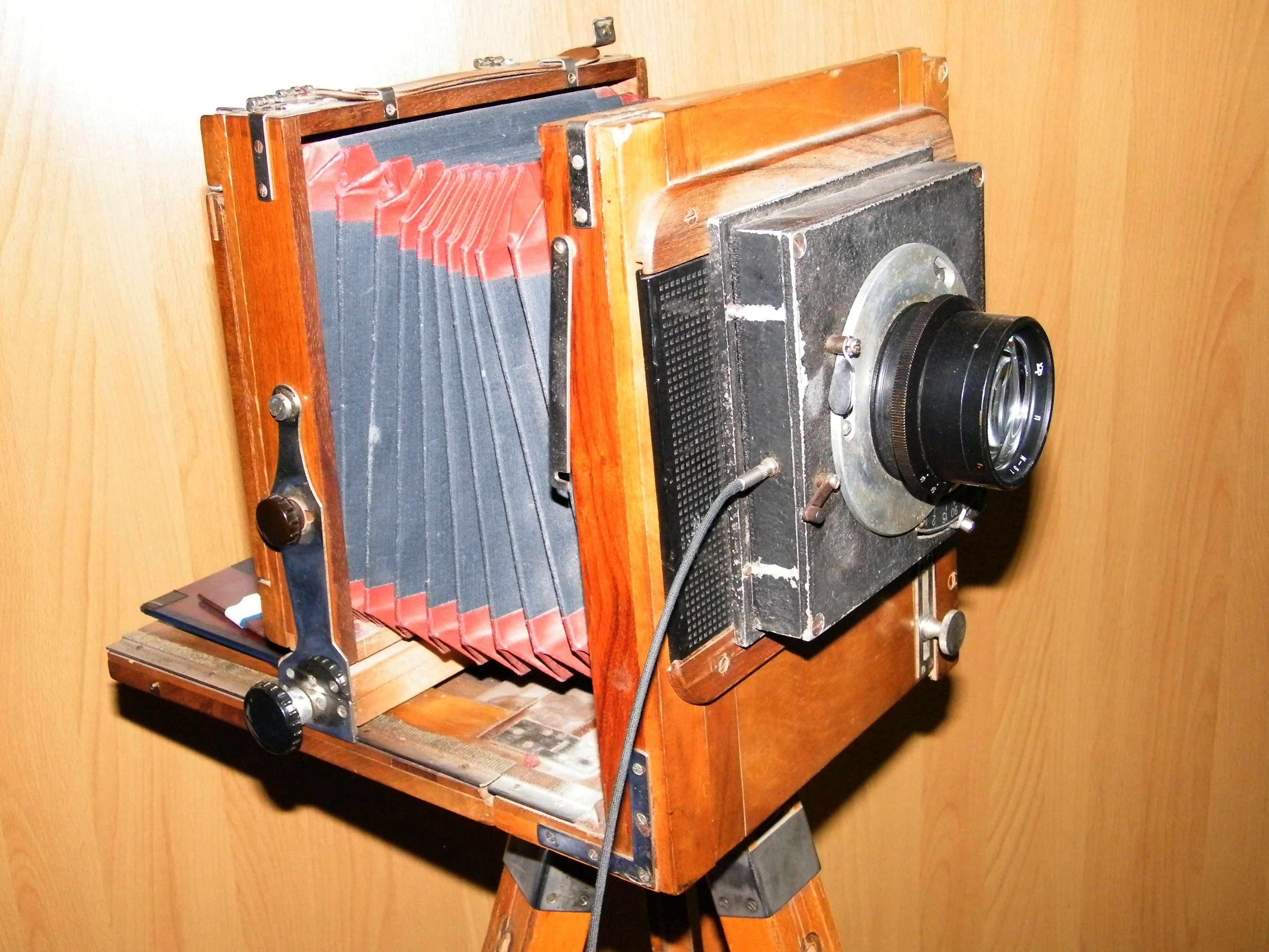 Фотоаппарат ФКД 13×18